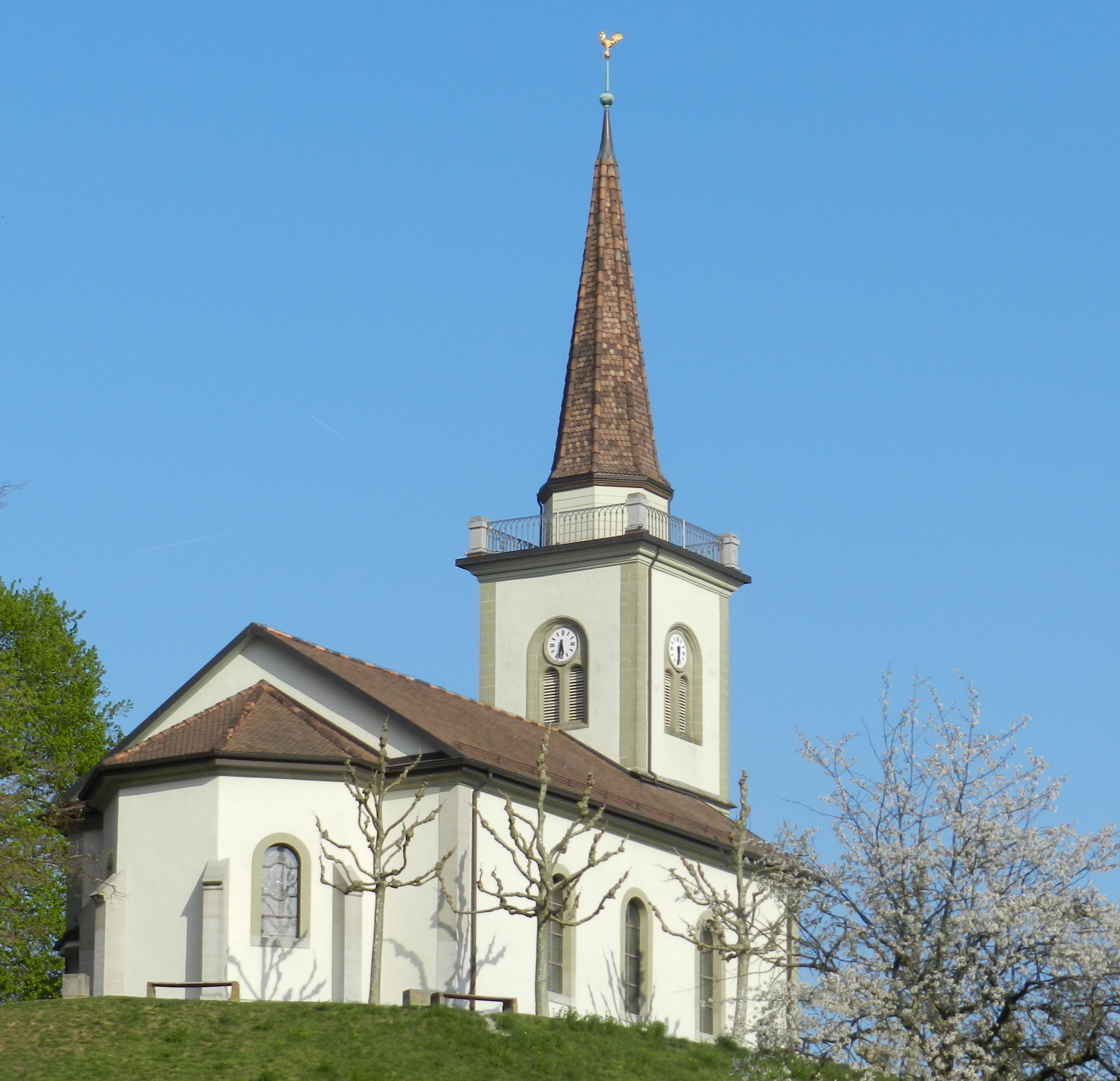 Aperçu du temple de Bussigny, bâtiment visible de loin et souvent associé à la ville.